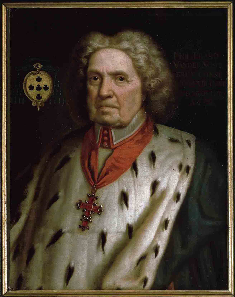 Sint-Baafskathedraal, Gent Portret van Mgr. Vander Noot; inv nr: 499/15